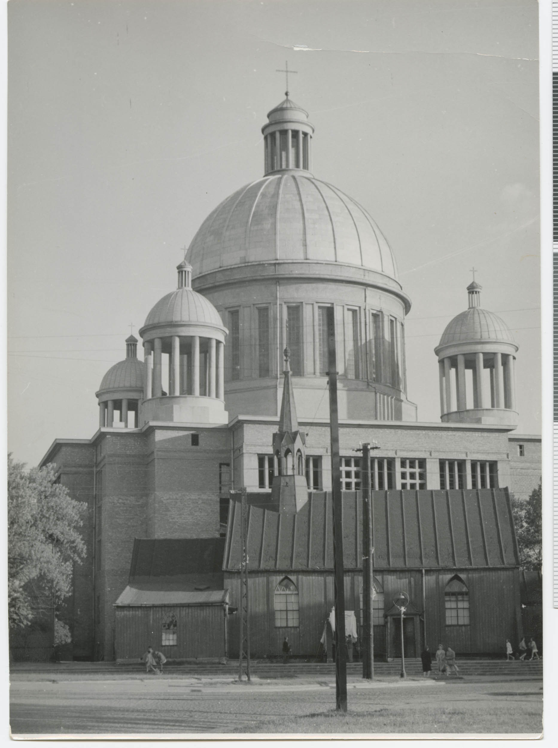 Fotografia Ignacego Płażewskiego przedstawiająca murowany kościół pw. Świętej Teresy od Dzieciątka Jezus i Świętego Jana Bosko oraz wcześniejszy drewniany kościół, znajdujące się u zbiegu ulic Kopcińskiego, Marcela Nowotki (ob. Pomorska), Strykowskiej i Uniwersyteckiej. Fotografia powstała przed 1963 r., kiedy ukończono budowę murowanej świątyni, a stary, drewniany kościół został rozebrany. Świątynia którą widać na pierwszym planie stała w tym miejscu od 1927 r., kiedy to została przeniesiona z Chojen z ul. Rzgowskiej (na jej miejscu stanął kościół pw. św. Wojciecha). Drewniany kościół powstał pod koniec XV w., lecz widoczna na zdjęciu jego forma została poddana znacznym modyfikacjom względem pierwotnej konstrukcji. Budowa nowego, monumentalnego kościoła według projektu Józefa i Witolda Korskich, który widać na drugim planie rozpoczęła się już w 1950 r., a ukończona została w 1963 r. Świątynia powstała na planie krzyża greckiego, jej podstawa ma wymiary 50 m na 50 m, a wysokość wynosi 64 m.